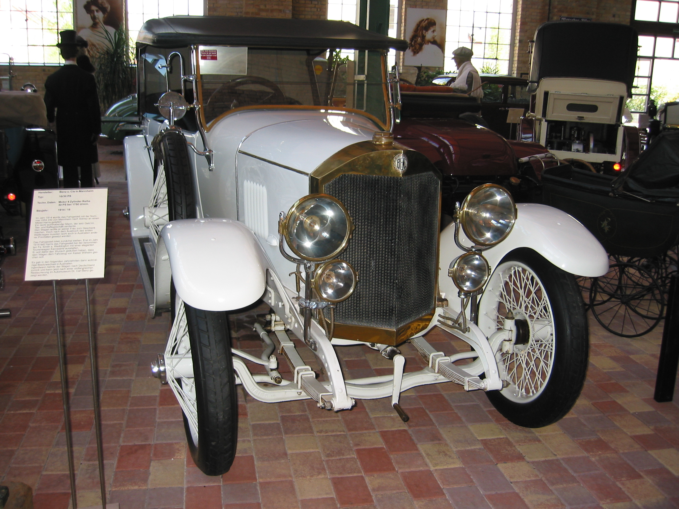 Benz 10/30 PS 1914